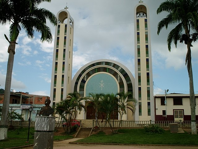 Parroquia San Rafael Arcangel-Cuicas